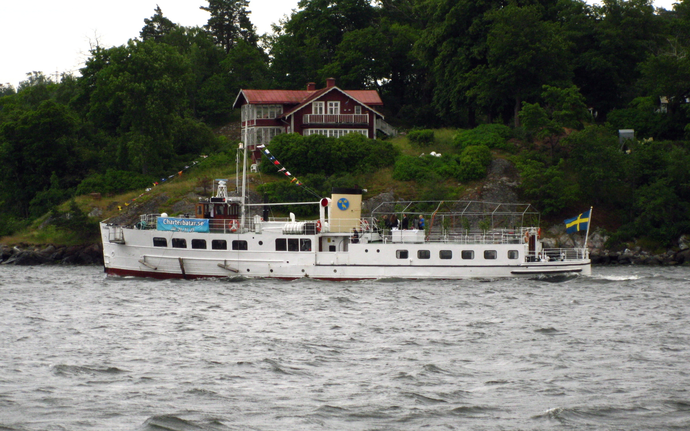 Motorfartyget Tranan